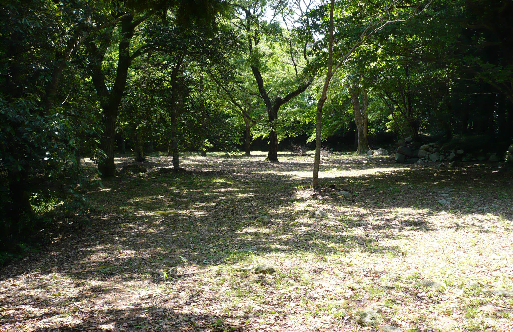 池田氏屋敷跡